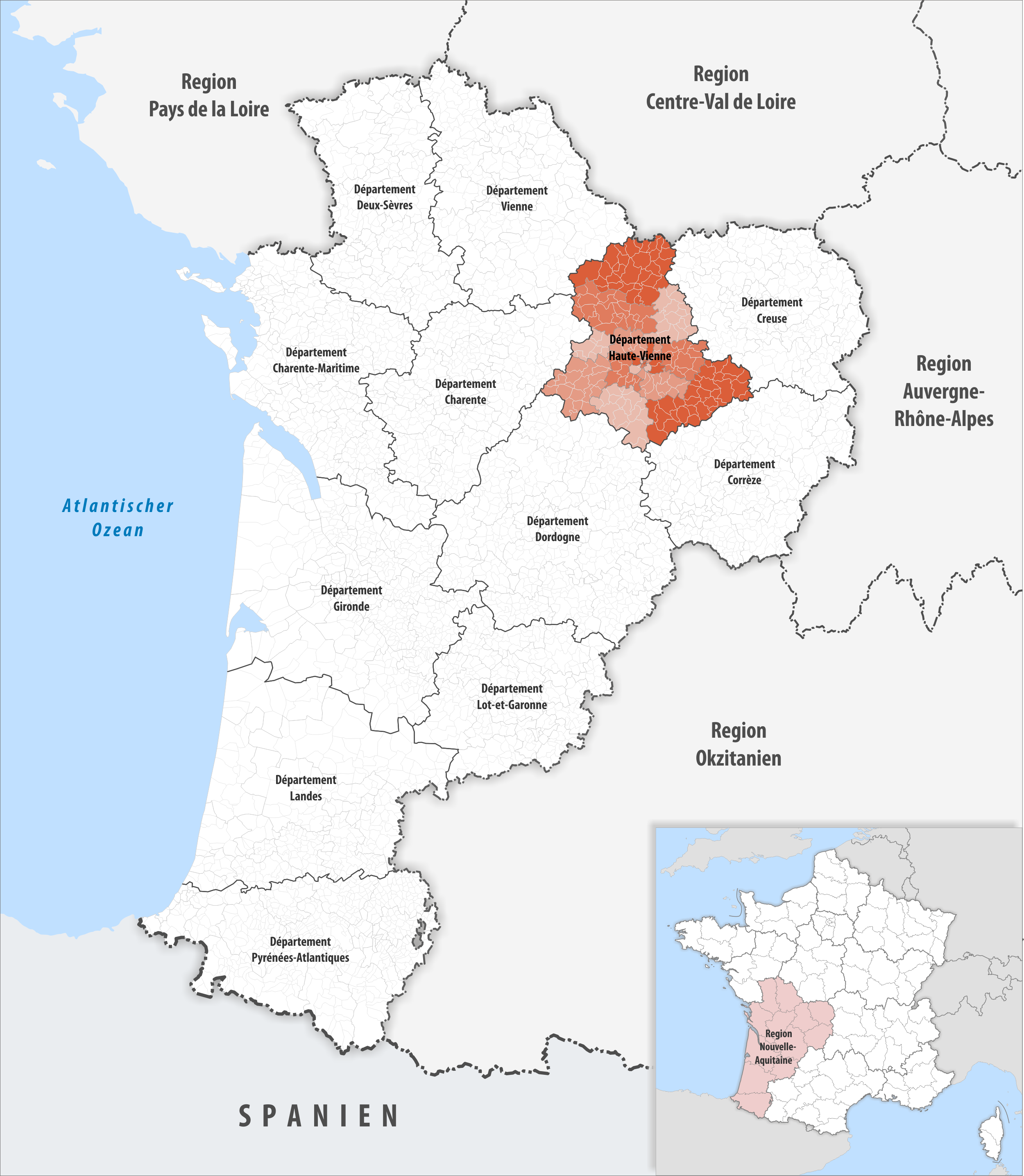 Lage des Departements Haute-Vienne